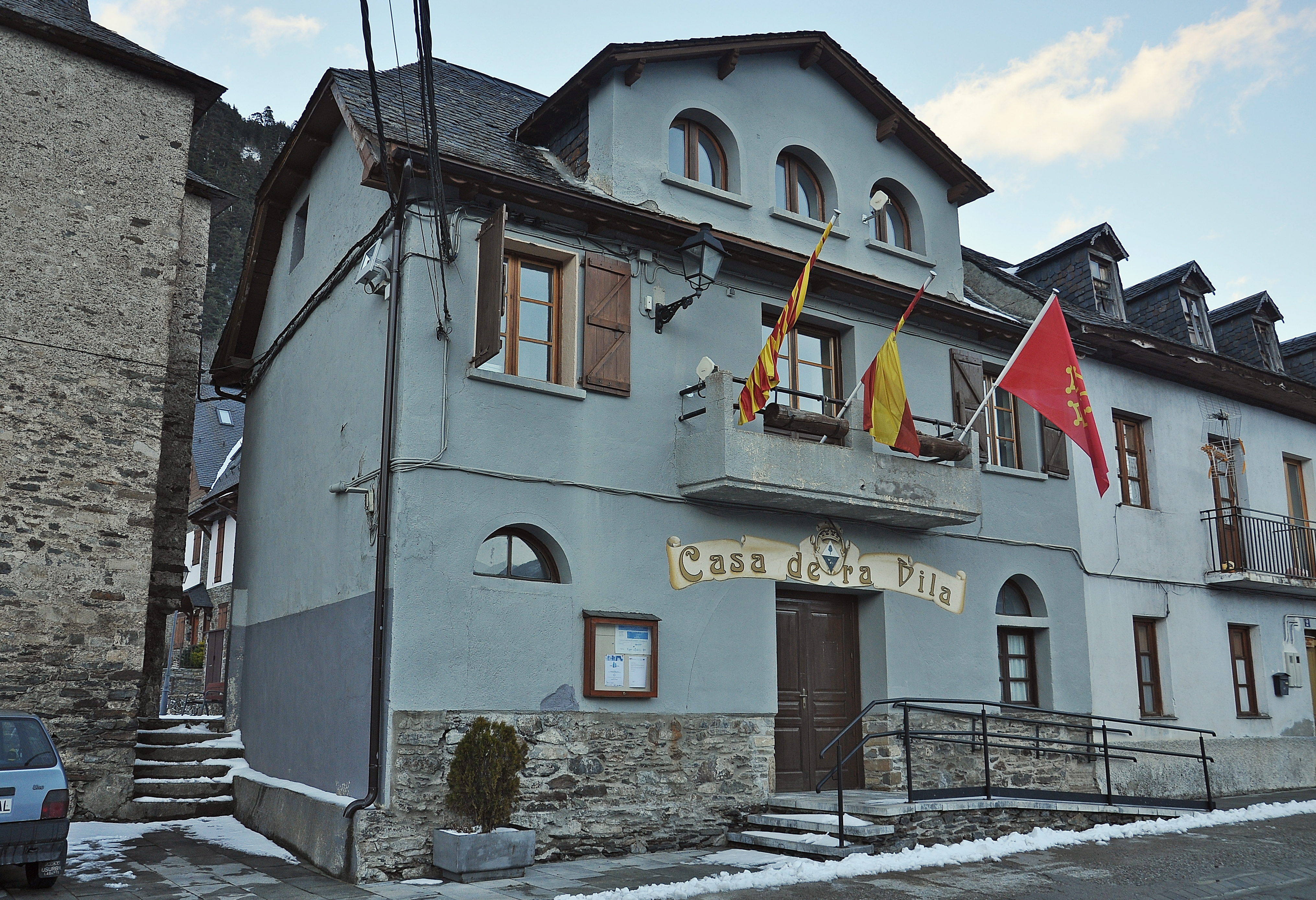 Valle de Aran-2016